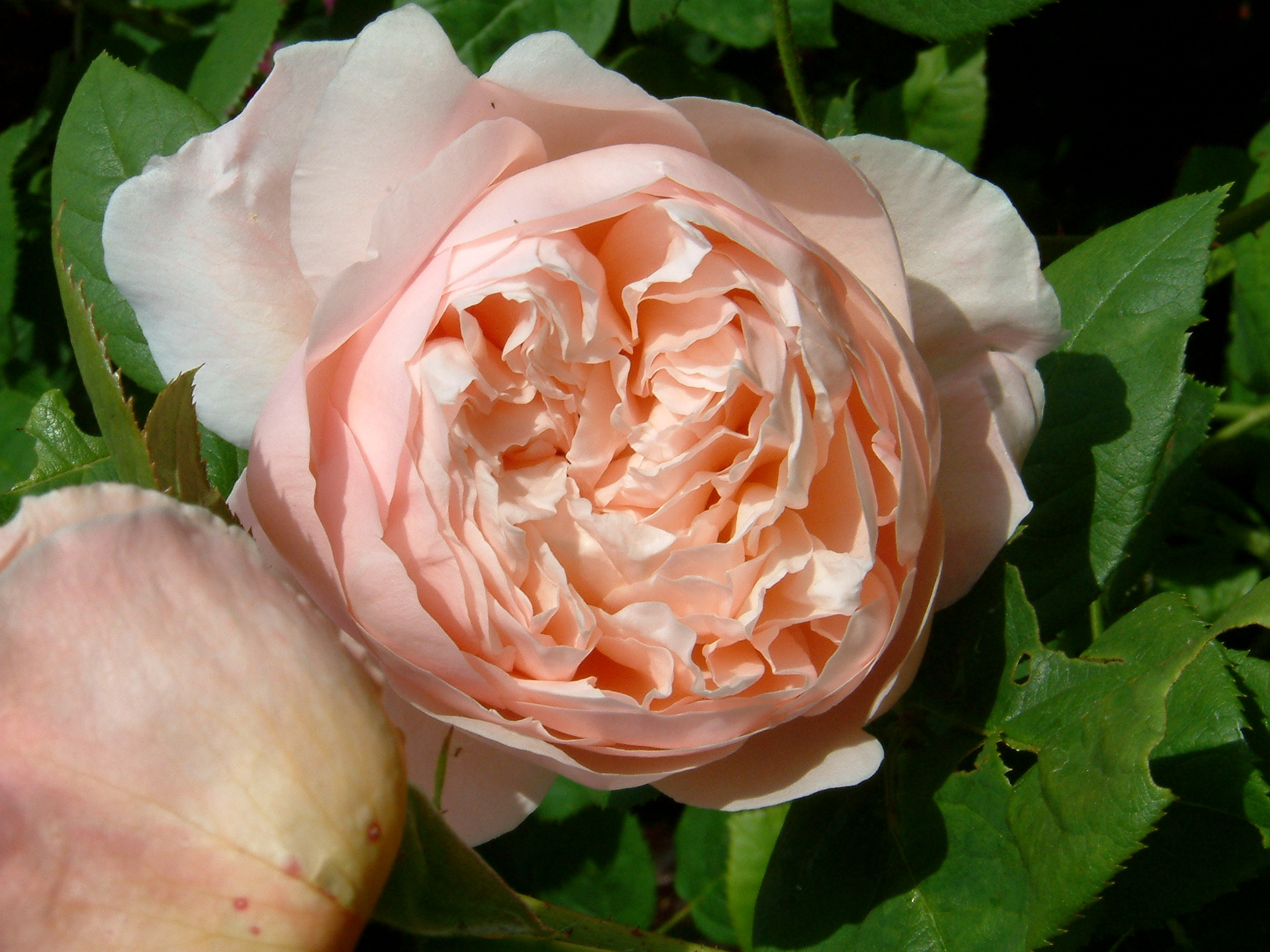 Rose 'Emily' (David Austin)